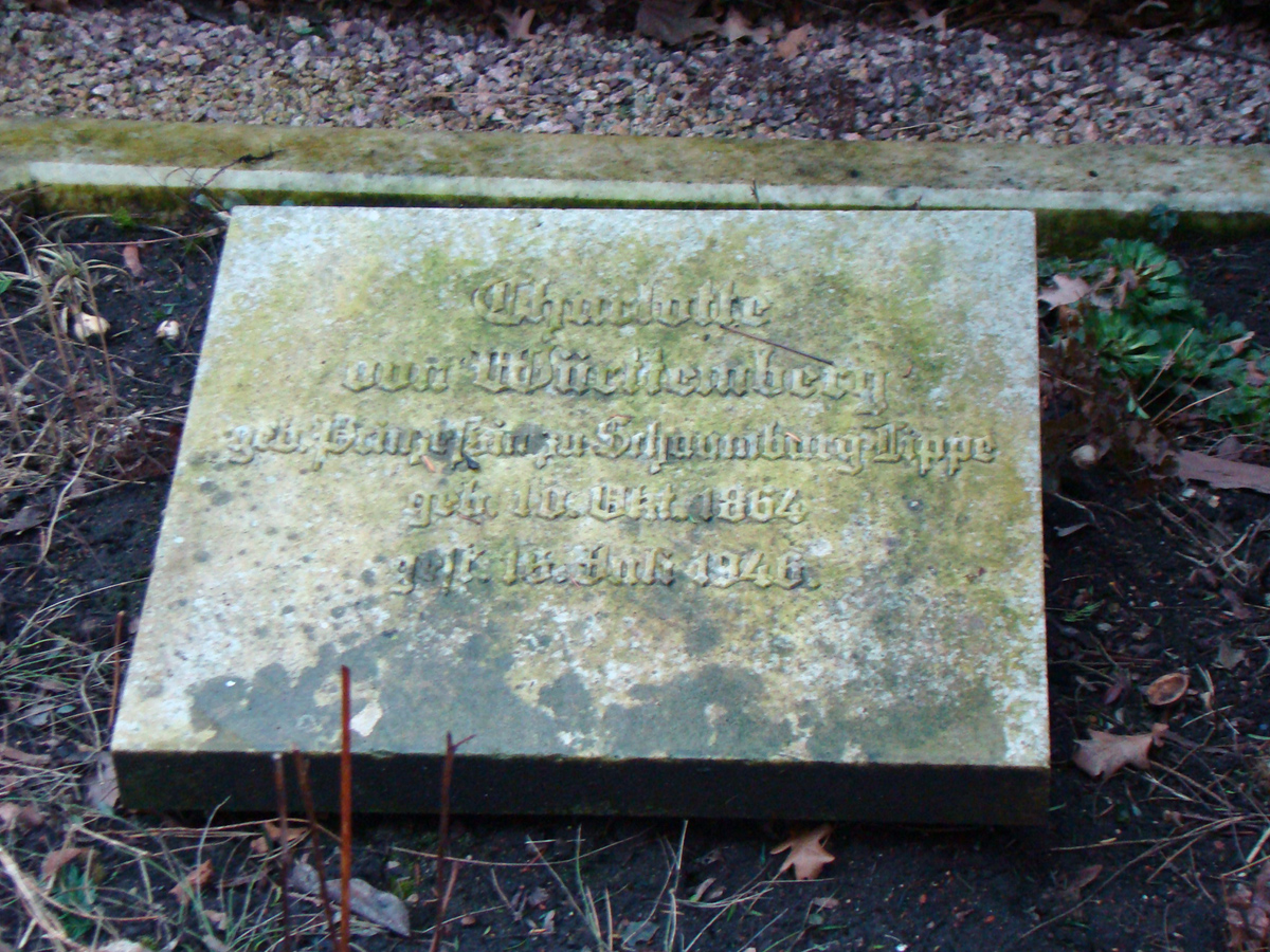 Alter Friedhof in Ludwigsburg, Grabmal Charlotte von Württemberg